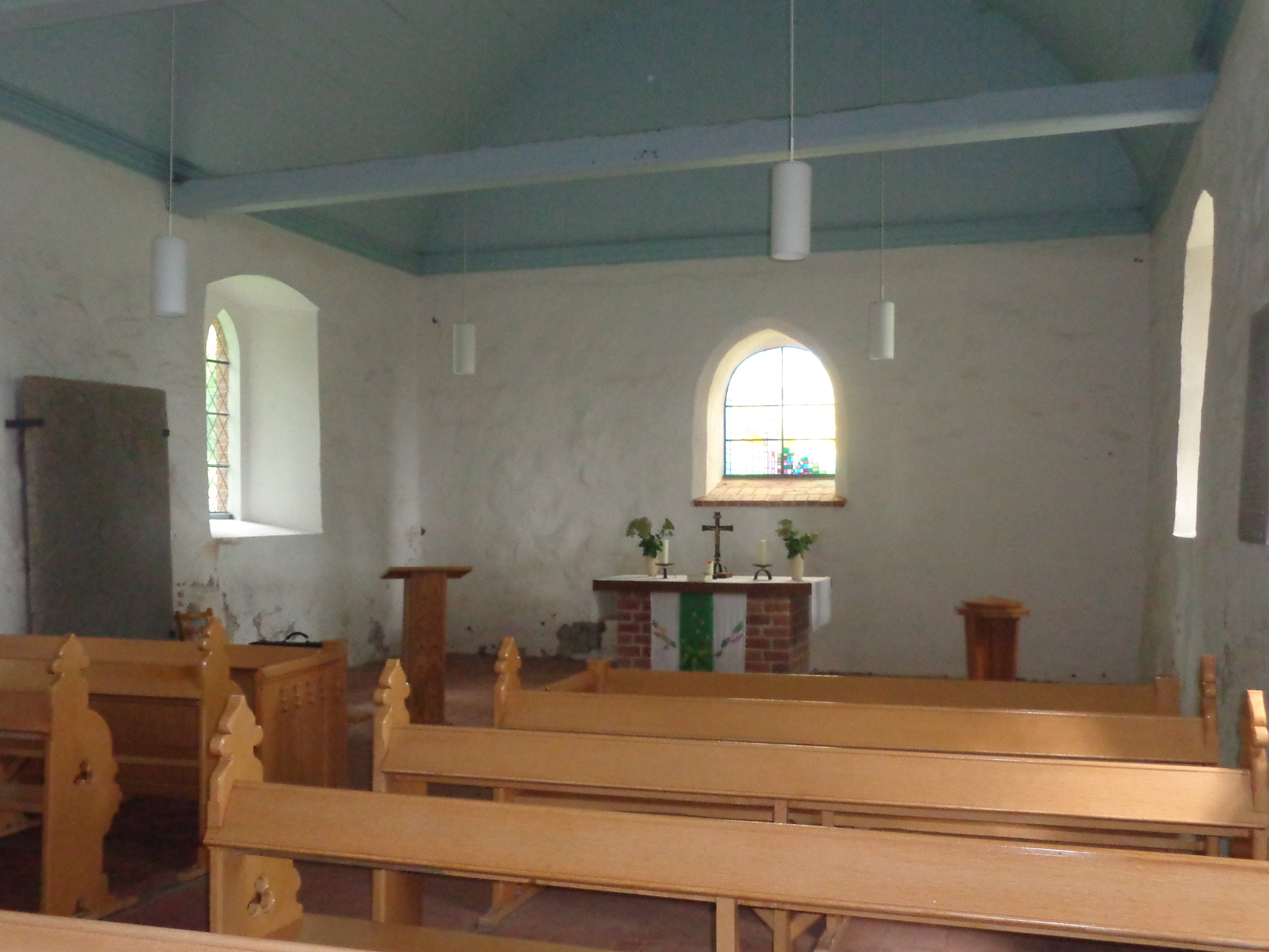 Innenraum der Dorfkirche Groß Poserin